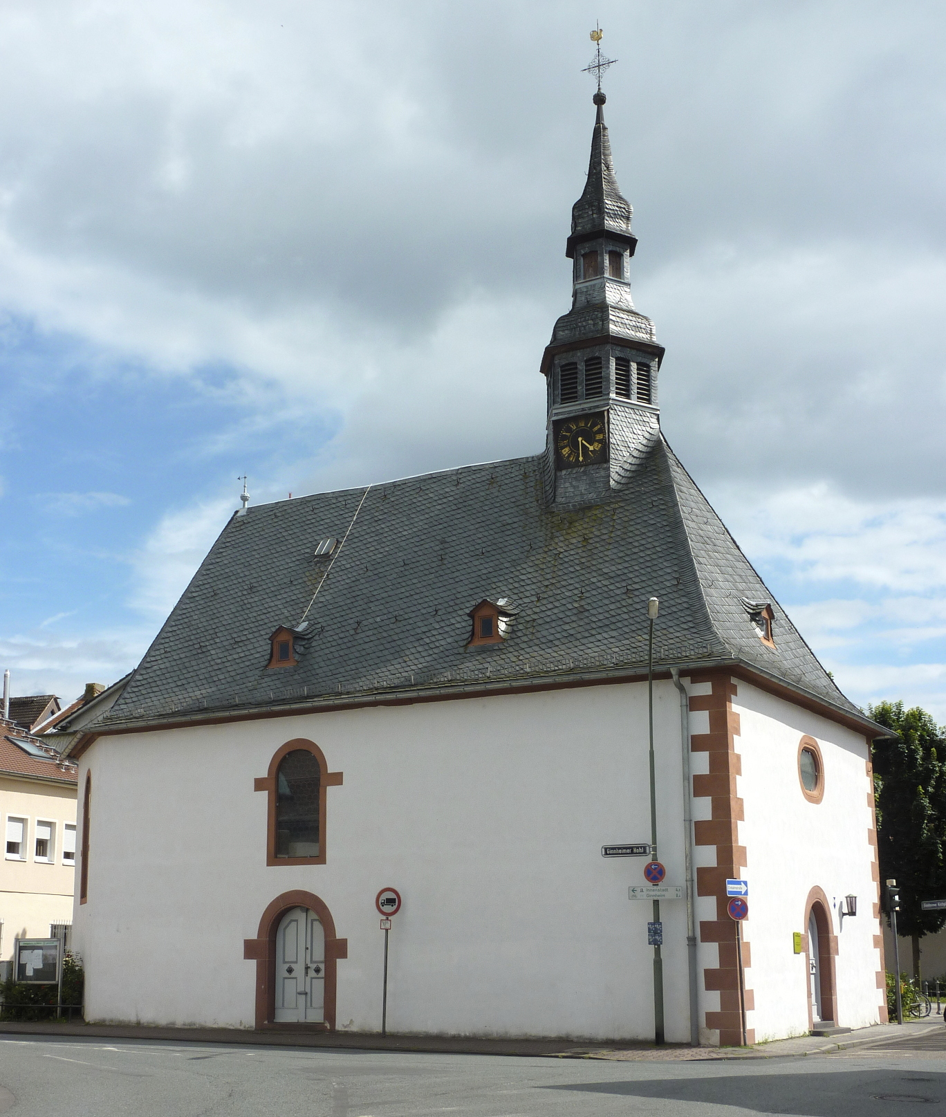 Frankfurt am Main, Stadtteil Ginnheim: Die Alte Bethlehemkirche ist eine von 1699 bis 1700 als evangelisch-lutherisches Gotteshaus erbaute barocke Saalkirche im Ortsteil Alt-Ginnheim. Der Kirchenbau entstand als Folge der Bikonfessionalität vom 17. bis zum 18. Jahrhundert – evangelisch lutherisch und evangelisch-reformiert – des damals zur Grafschaft Hanau-Münzenberg gehörenden Dorfes. Das Foto zeigt eine Totalansicht der Kirche von Nordwesten